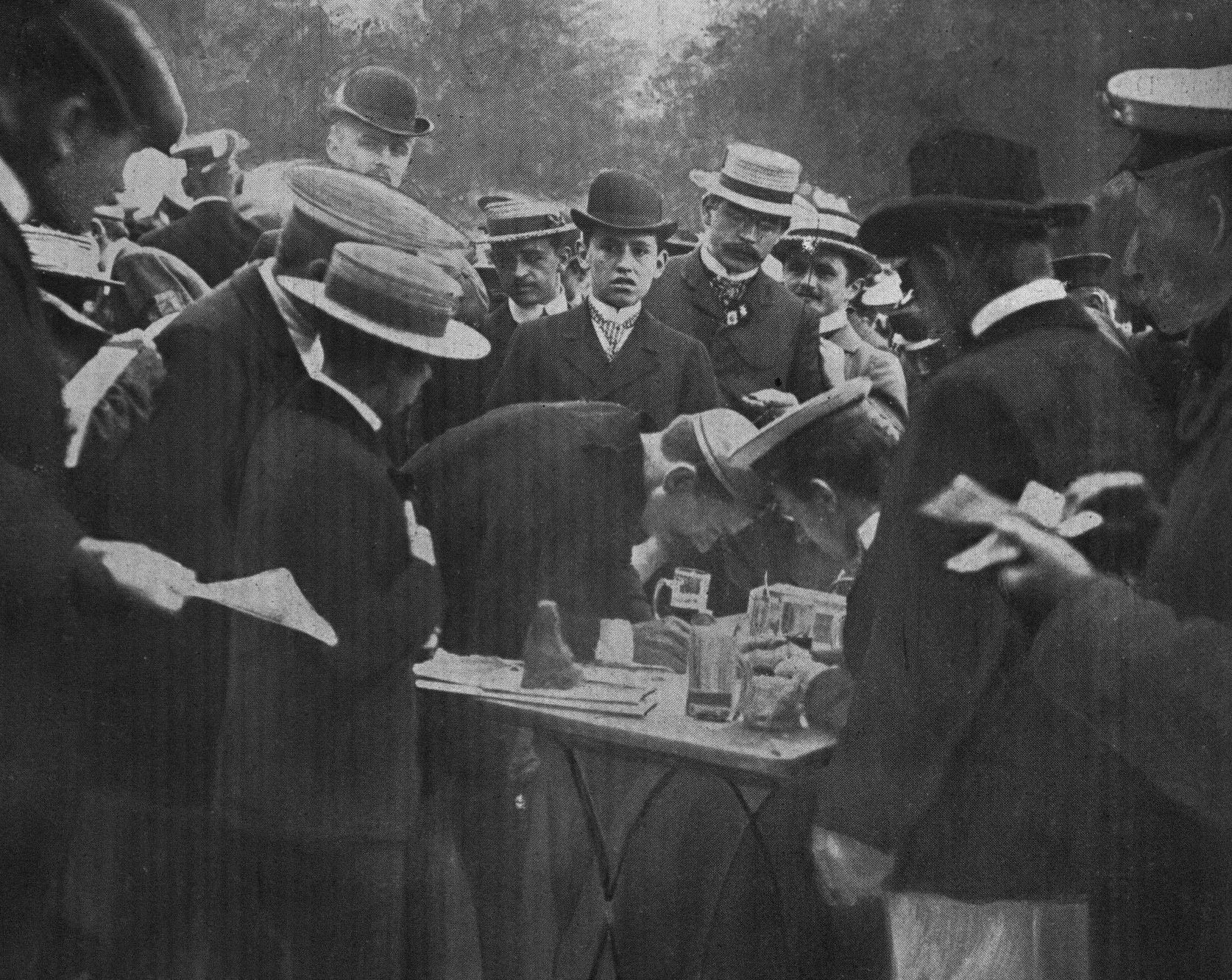 Adolf Böhm, der spätere Gewinner von "Rund um Berlin" 1905, trägt sich in das Kontrollbuch ein.